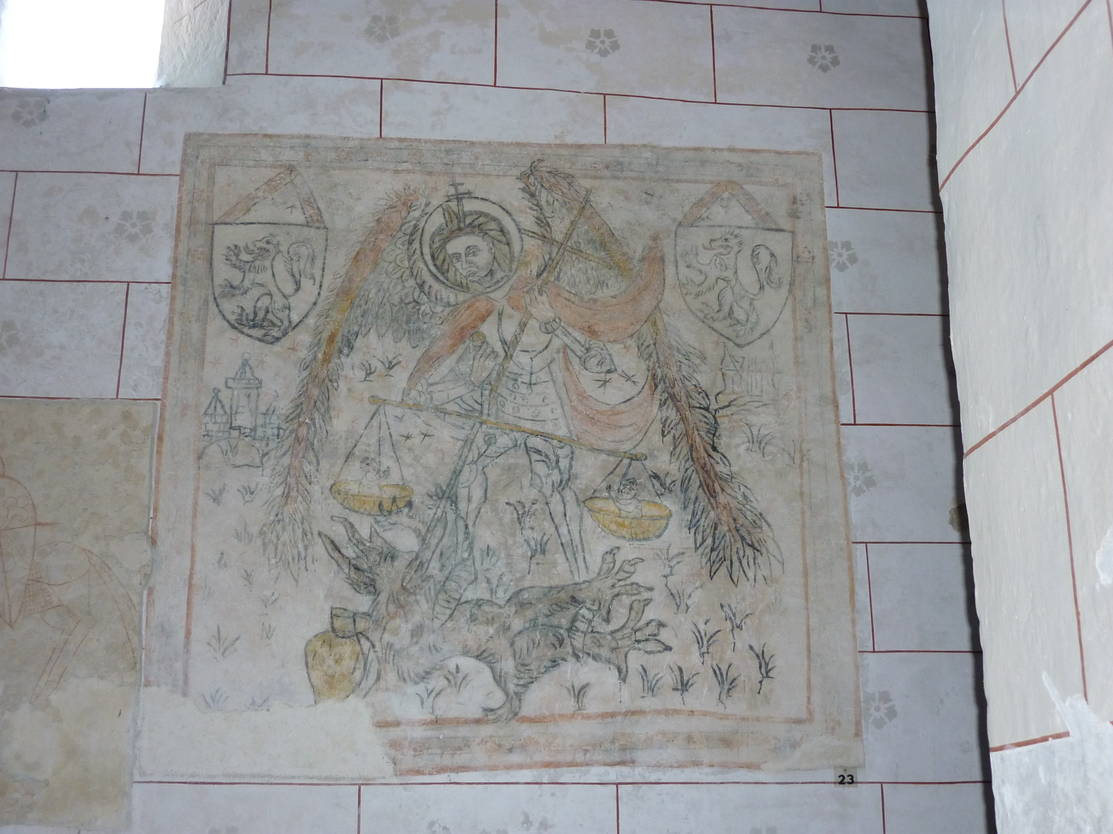 Oeuvre du XVie Siècle (entre 1460 et 1470) découvert dans les années 1950 et classé aux Monuments Historiques en 1995.